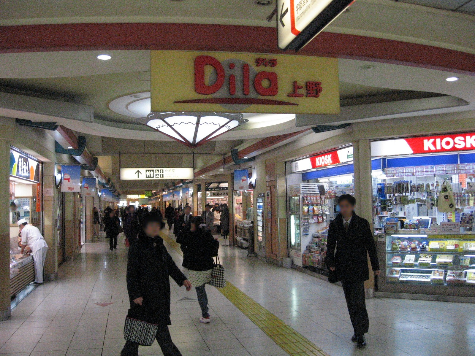 Dila Ueno